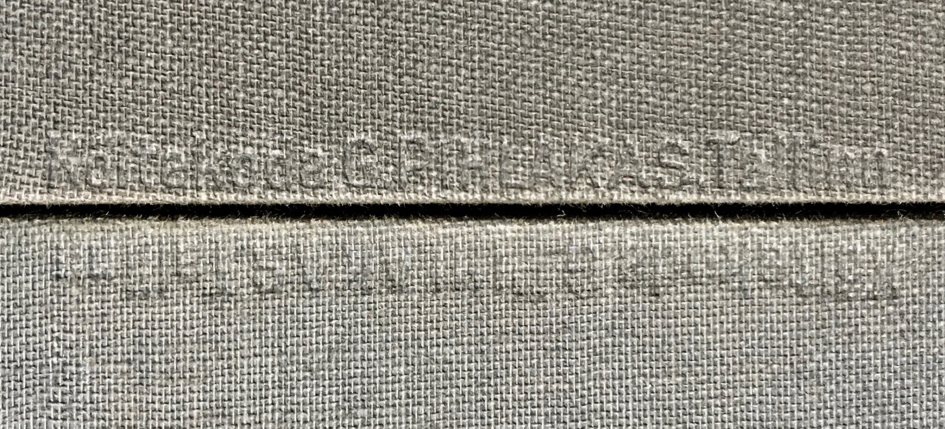 Pihlakas embleem